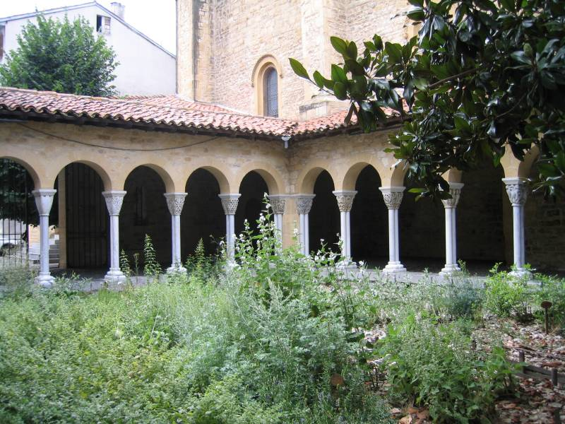 Jardin du cloitre de Saint-Gaudens.